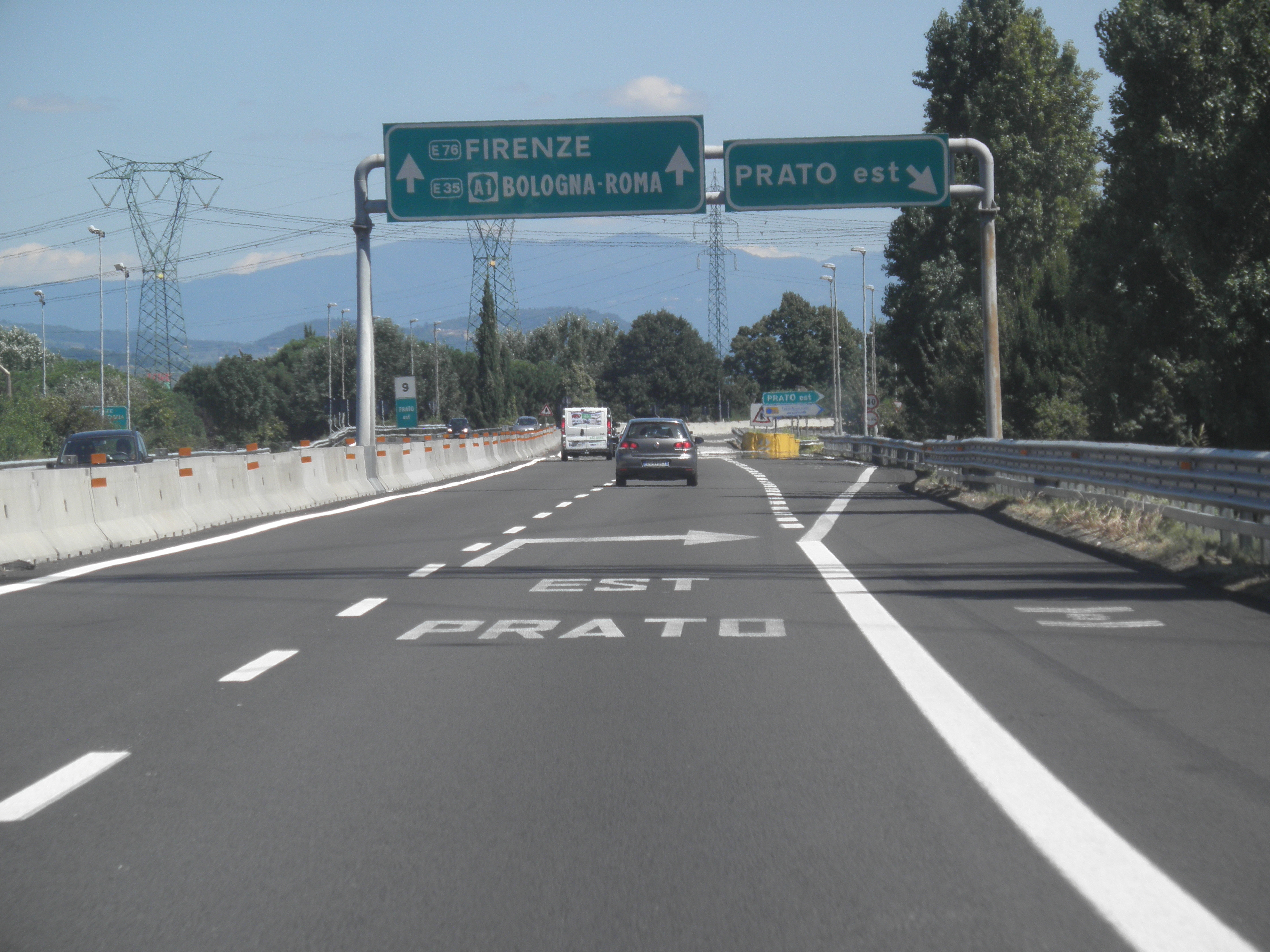 Un tratto dell'autostrada A11.